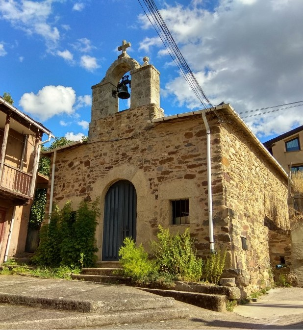 Foto de la ermita